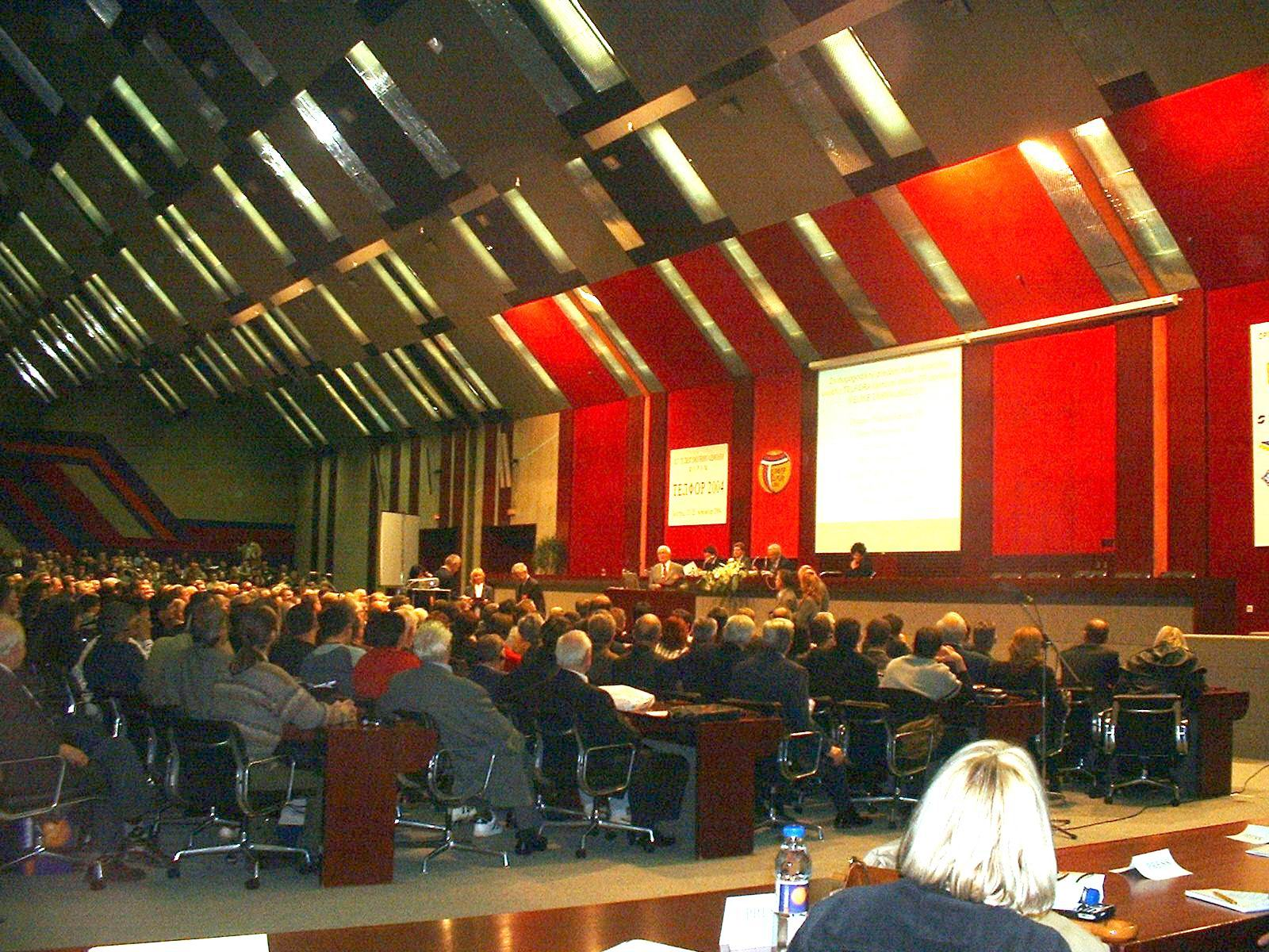 Телфор 2004 свечано отварање у Сава Центру Београд